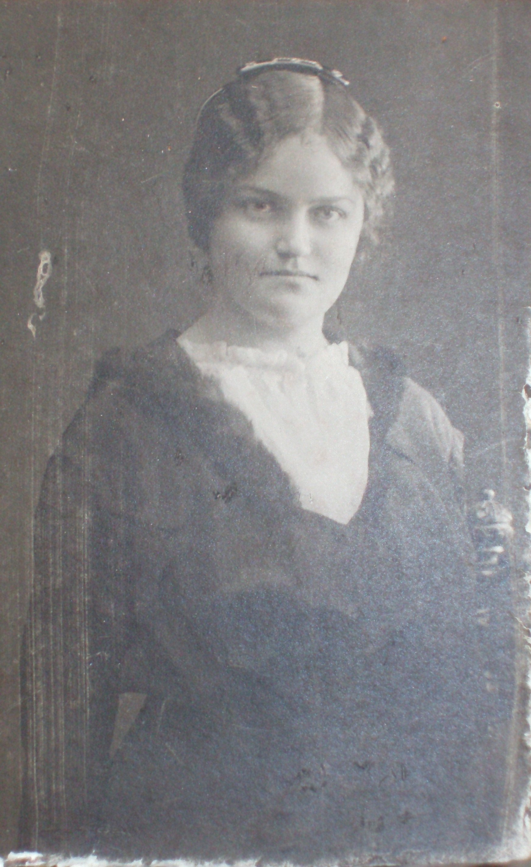 Мария Дмитриевна Успенская